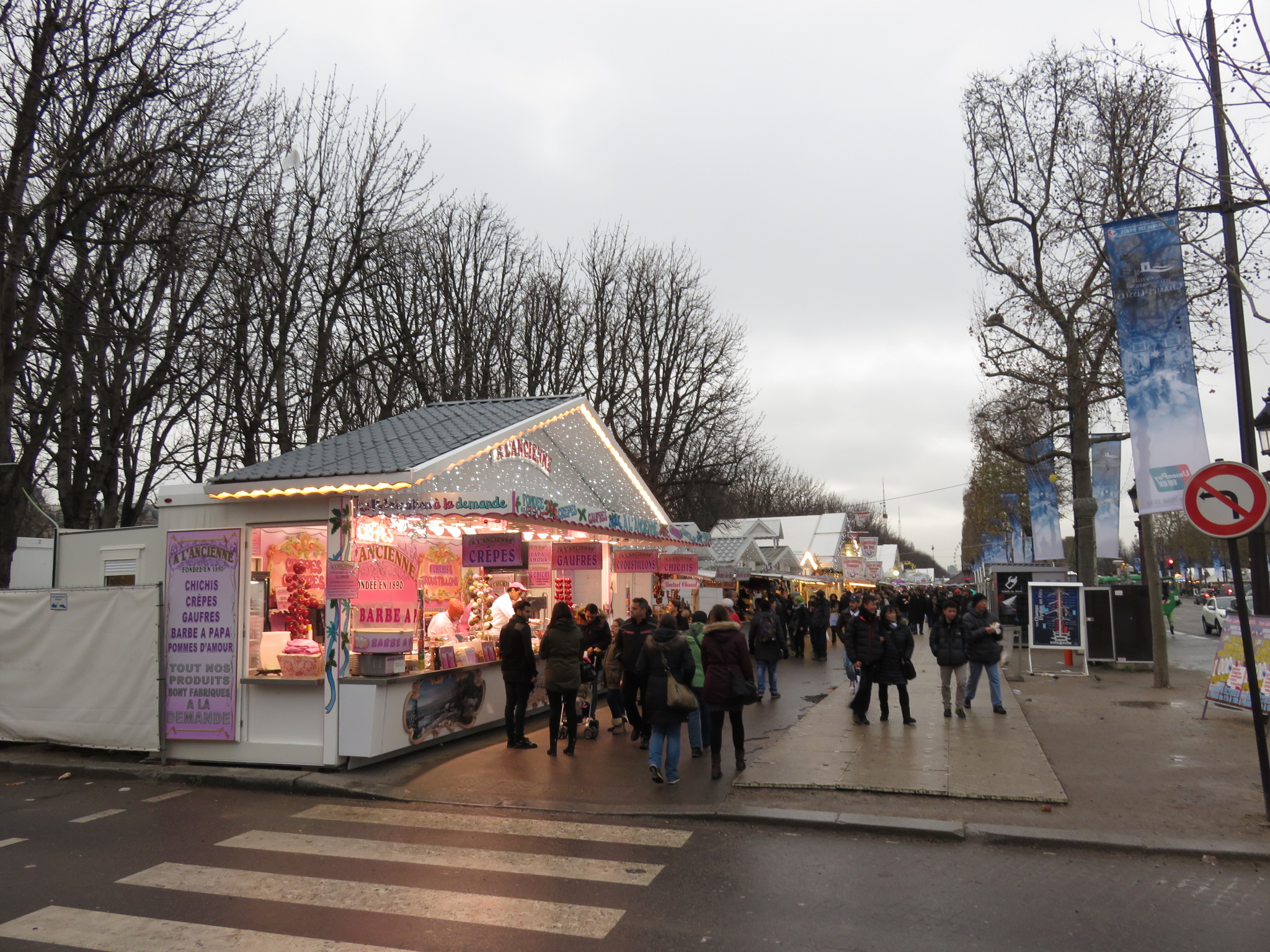 Marché de Noël des Champs-Elysées